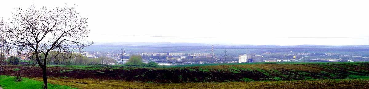 Rimavska Sobota - panorama.